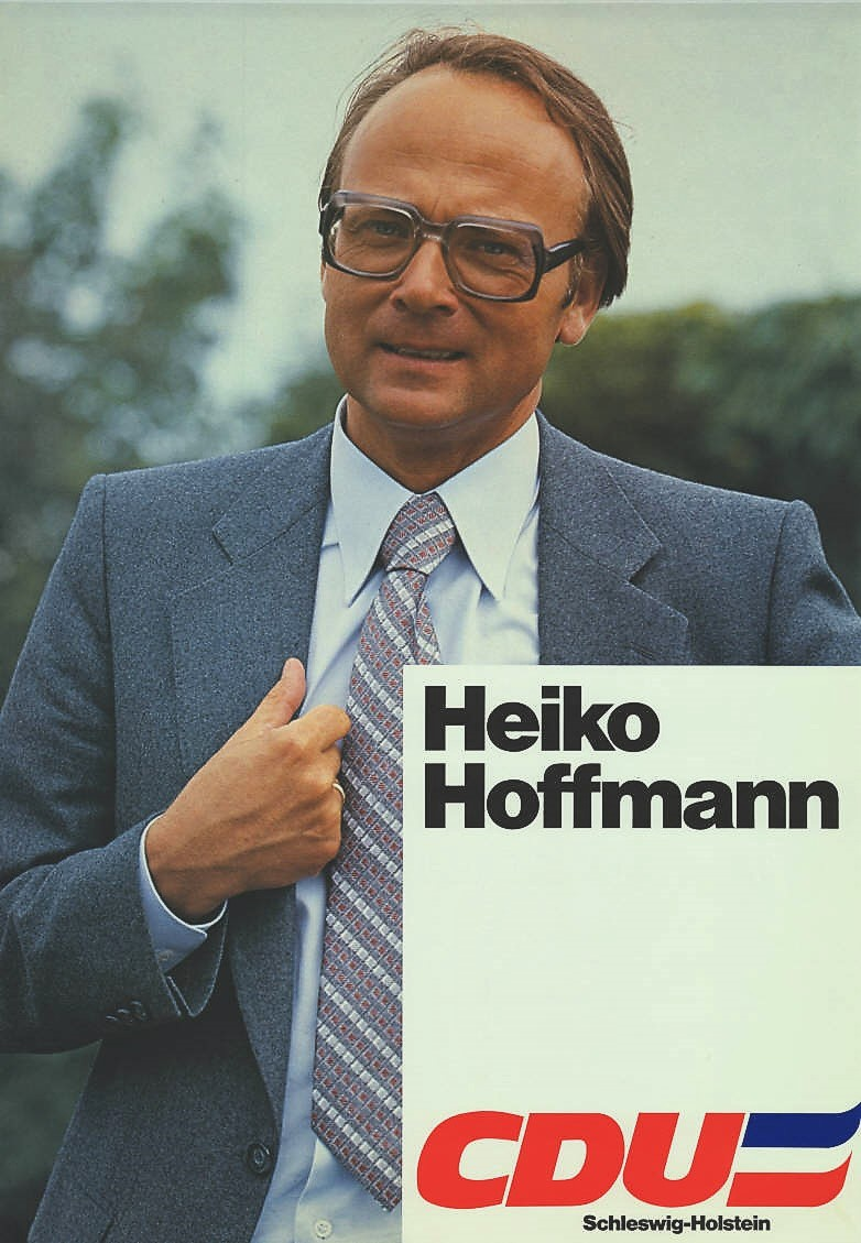 Heiko Hoffmann CDU Schleswig-Holstein Abbildung: Foto Plakatart: Kandidaten-/Personenplakat mit Porträt Auftraggeber: Verantw.: CDU Schleswig-Holstein Objekt-Signatur: 10-012 : 437 Bestand: Landtagswahlplakate Schleswig-Holstein (10-012) GliederungBestand10-18: Landtagswahlplakate Schleswig-Holstein (10-012) » Landtagswahl am 29.4.1979 » Ankündigungsplakate Lizenz: KAS/ACDP 10-012 : 437 CC-BY-SA 3.0 DE